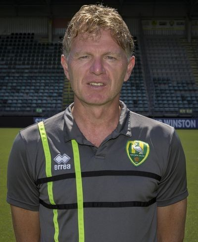 Alfons Groenendijk